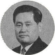 노석찬